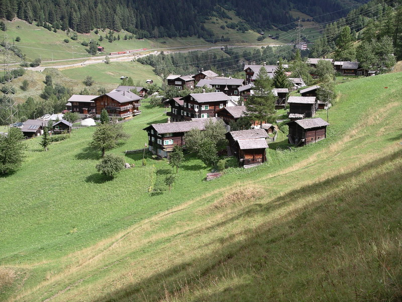 Steinhaus im Herbst 2004